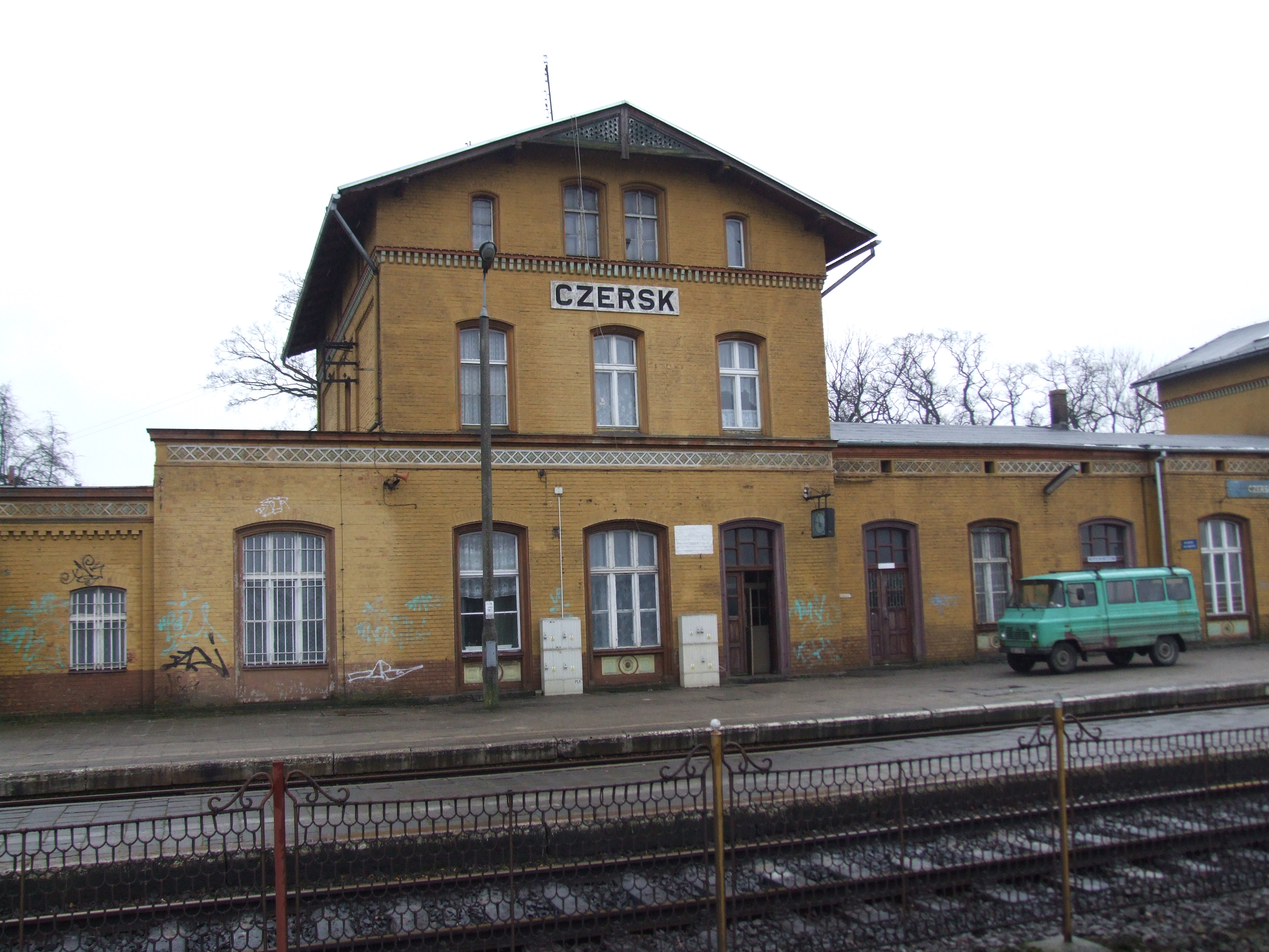 Czersk (dworzec kolejowy)